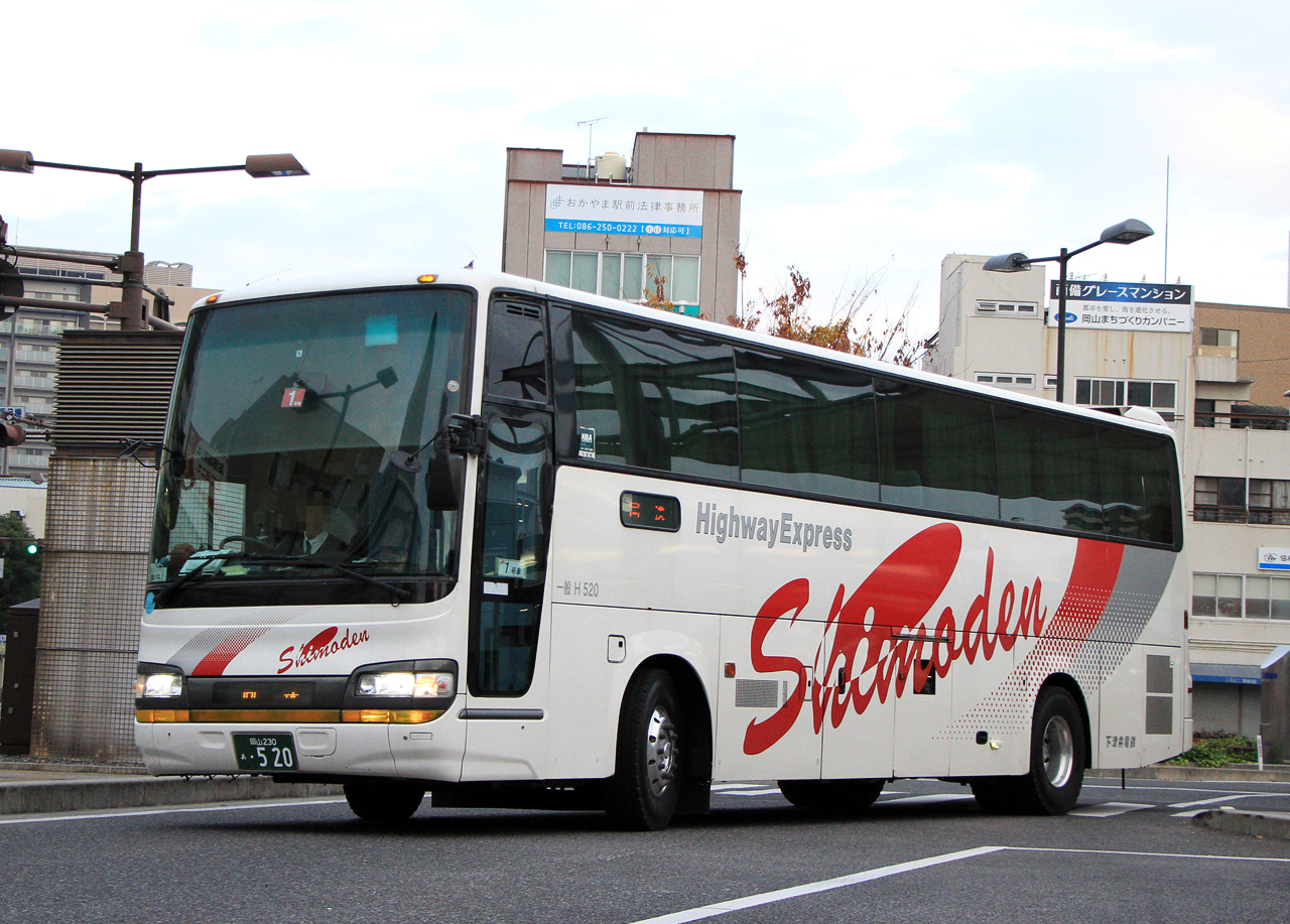 登録番号 岡山230あ・520 車番：H520 下津井電鉄㈱興除営業所所属 夜行高速用車両 2018年11月 岡山駅西口にて撮影 撮影者 Zondag2000